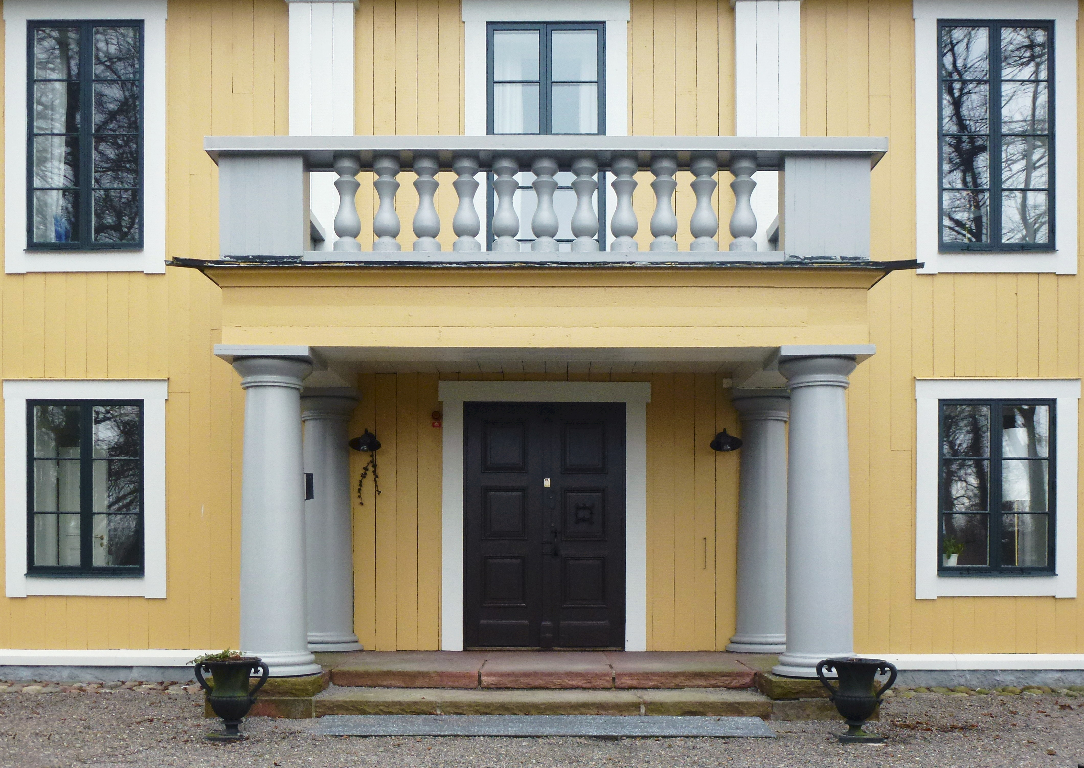 Älvsjö gård, huvudentré